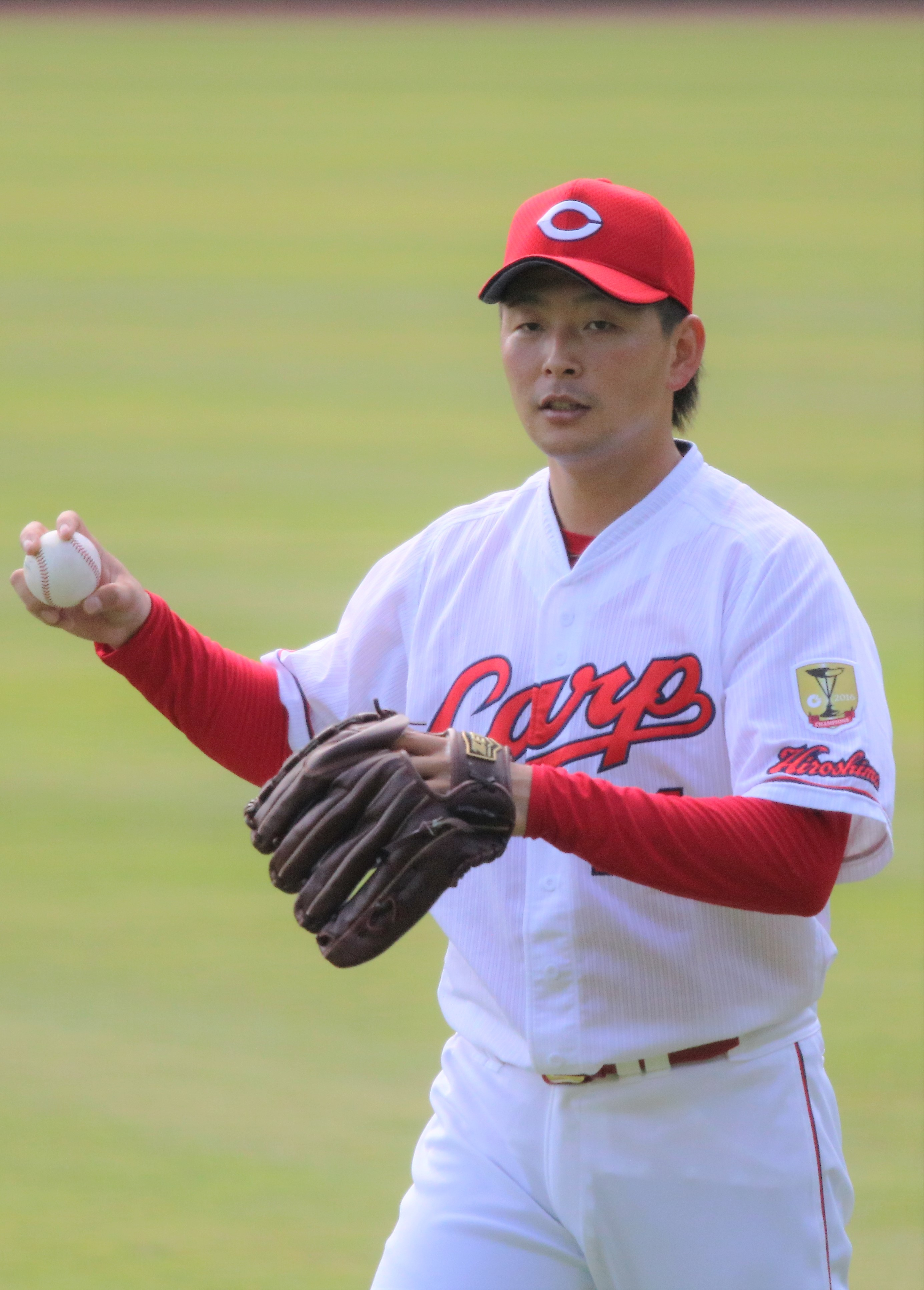 2017年11月7日 日南キャンプ